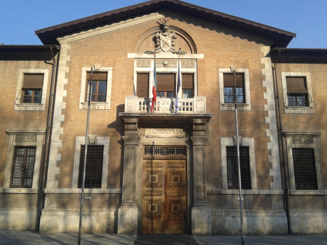 Il palazzo Torlonia di Avezzano